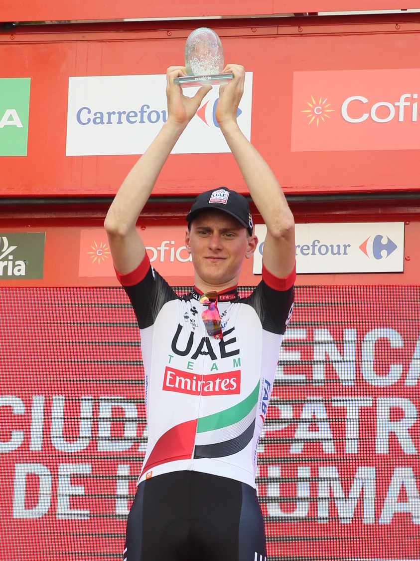 CUENCA, 25/08/2017. El presidente de Castilla-La Mancha, Emiliano García-Page, asiste al final de la séptima etapa de La Vuelta Ciclista a España, con meta en la capital conquense, donde hará entrega del premio al líder provisional de la clasificación general. (Fotos: Ignacio López//JCCM)